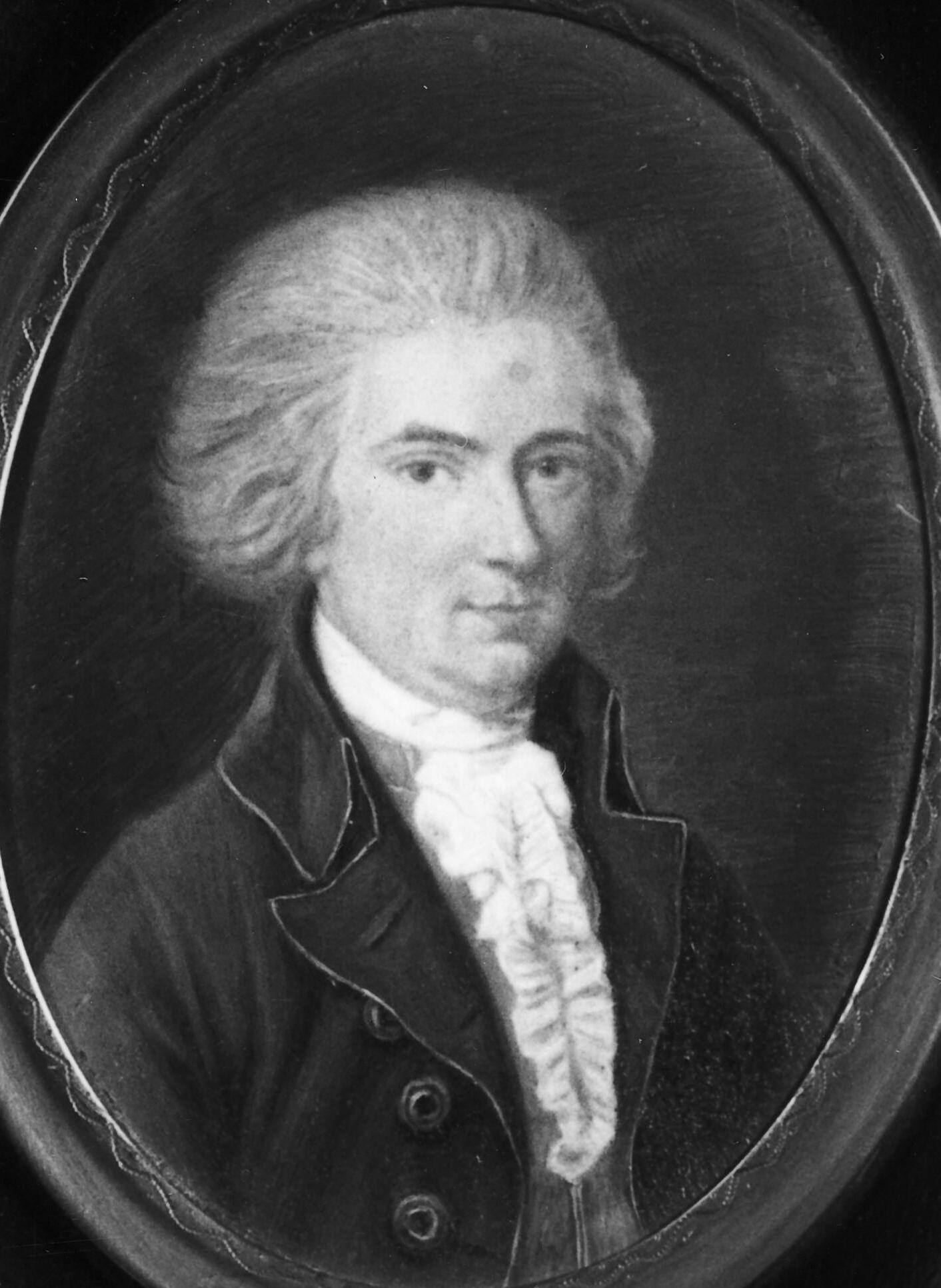 Kopie van een portret van Tethart Philipp Christian Haag uit 1794 van Otto baron van Randwijck (1763-1833), burgmeester van Nijmegen en Tweede Kamerlid